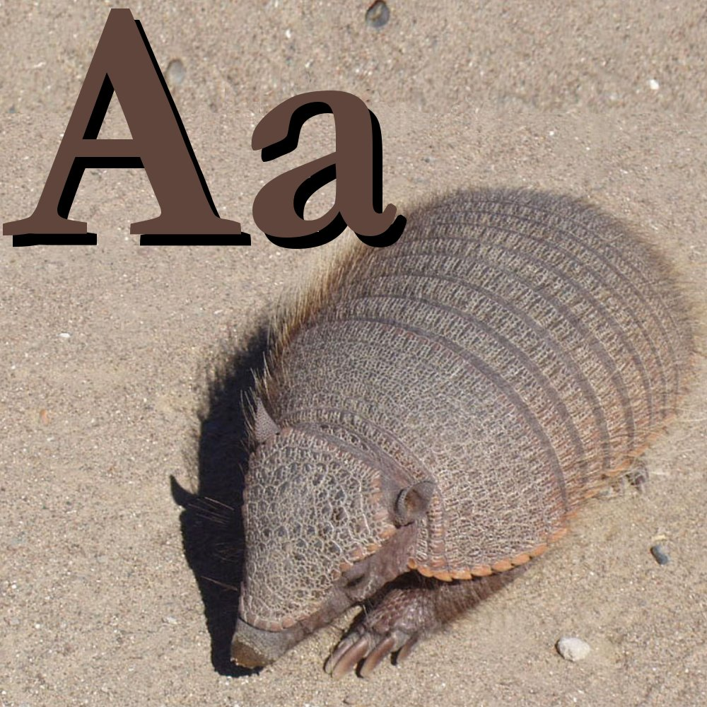 Animal Alphabet Letter Armadillo (Priodontes maximus)